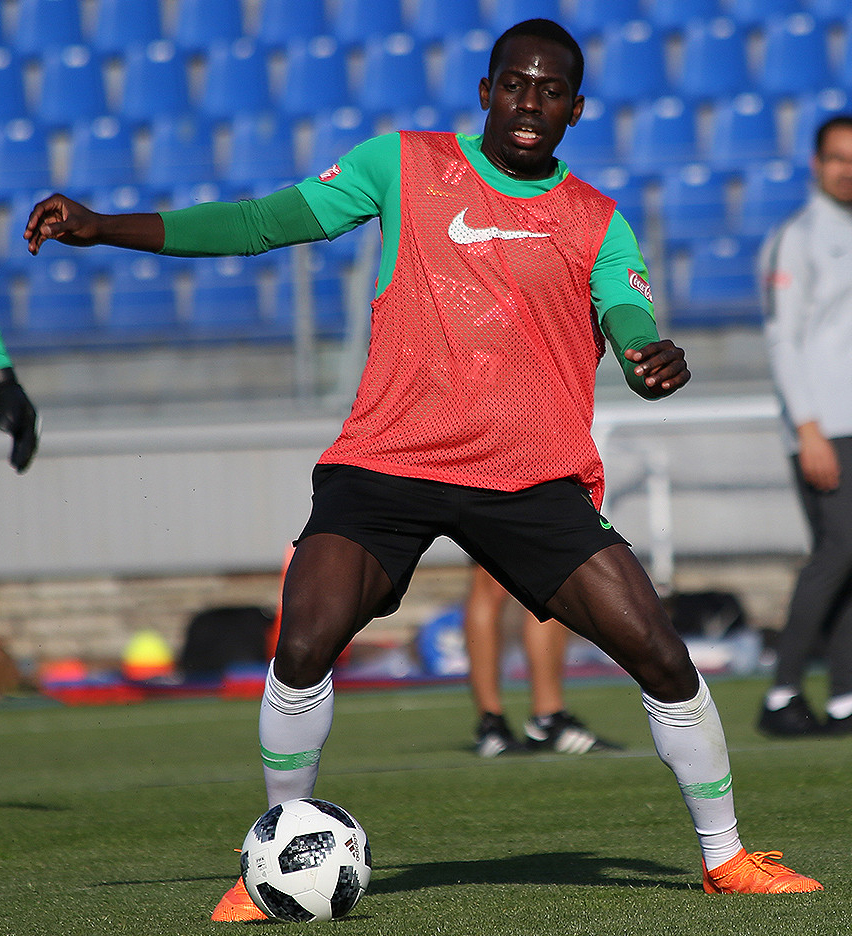 Сборная Саудовской Аравии потренировалась в Петербурге